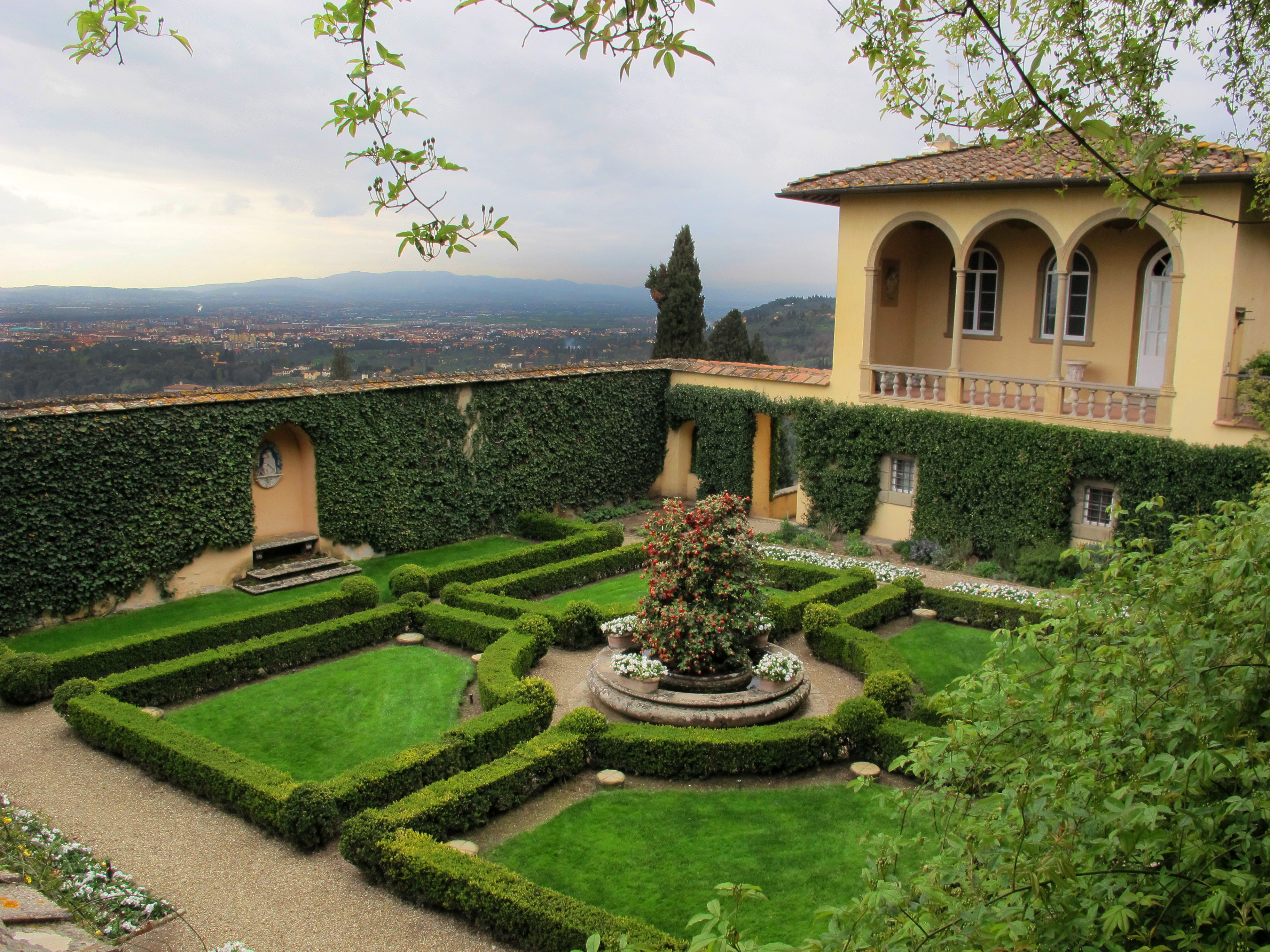 Le balze, giardino d'inverno